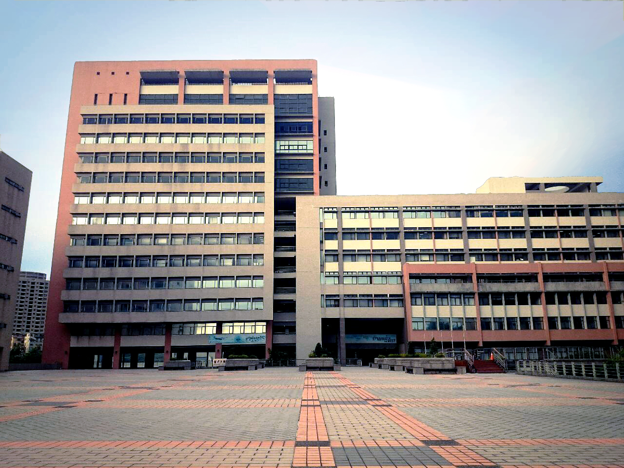 中文（台灣）: 長庚大學管理大樓